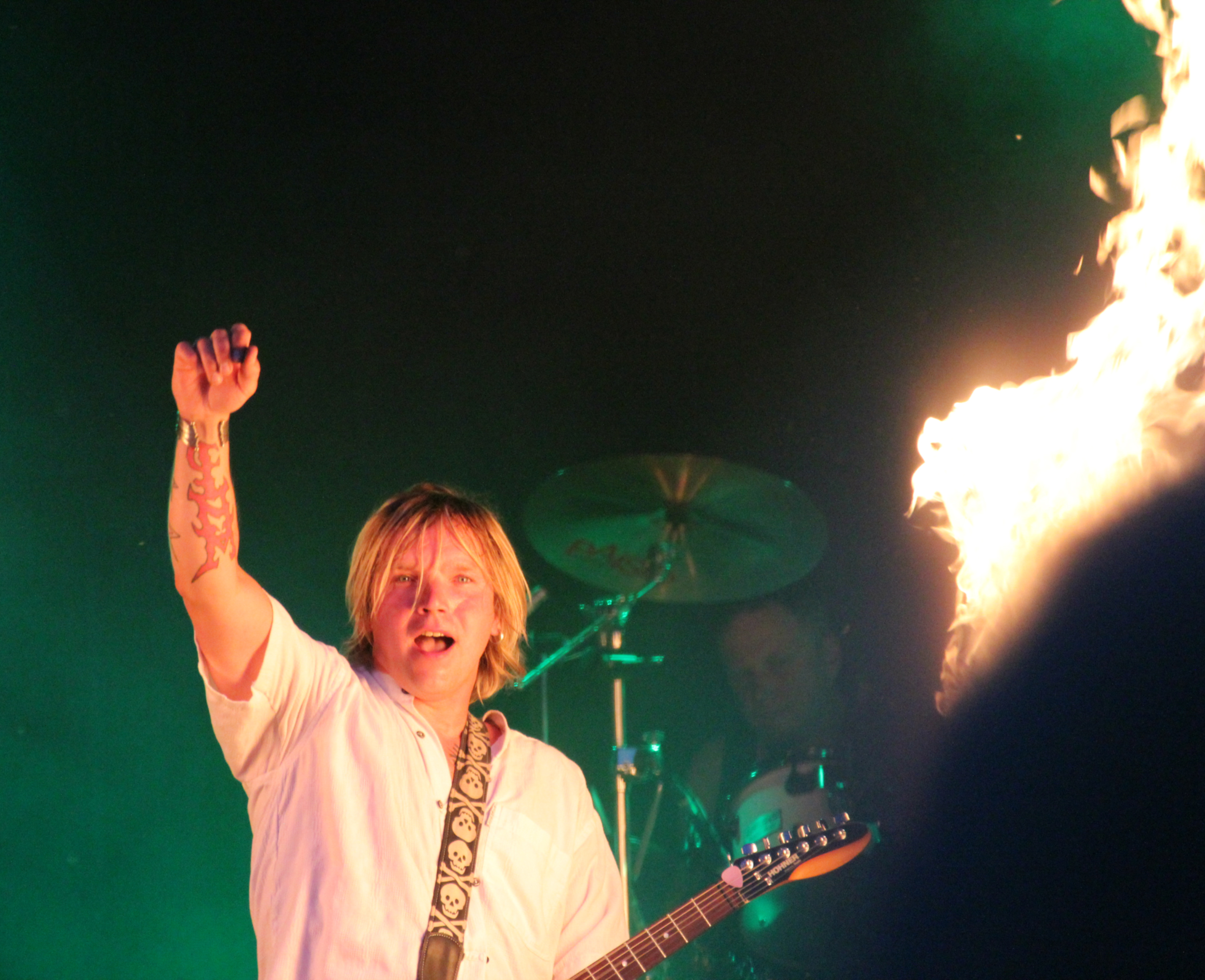 Jaagup Kreem esinemas Õllesummeril.